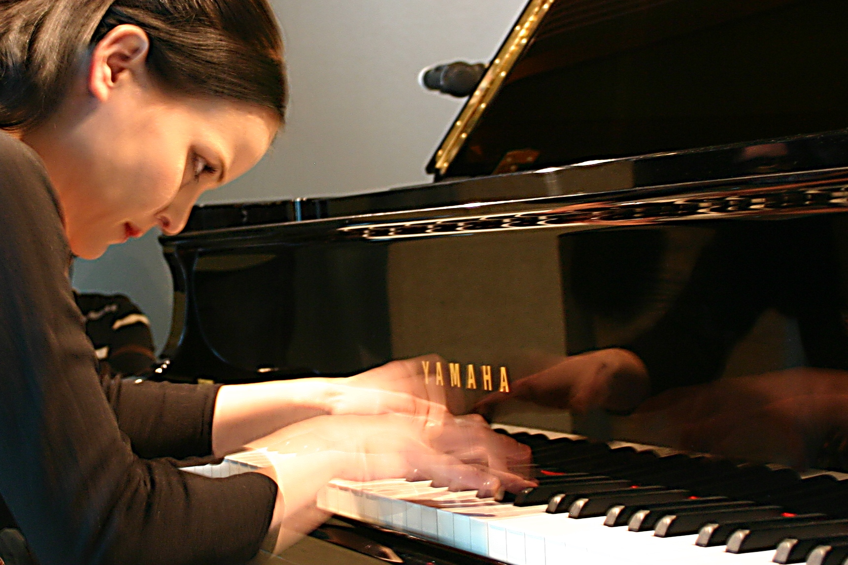 Am Sonntag, 10. Januar 2009 fand in der Beletage der Heinrich-Böll-Stiftung die Feier zum 30. Geburtstag von Bündnis 90/Die Grünen statt.